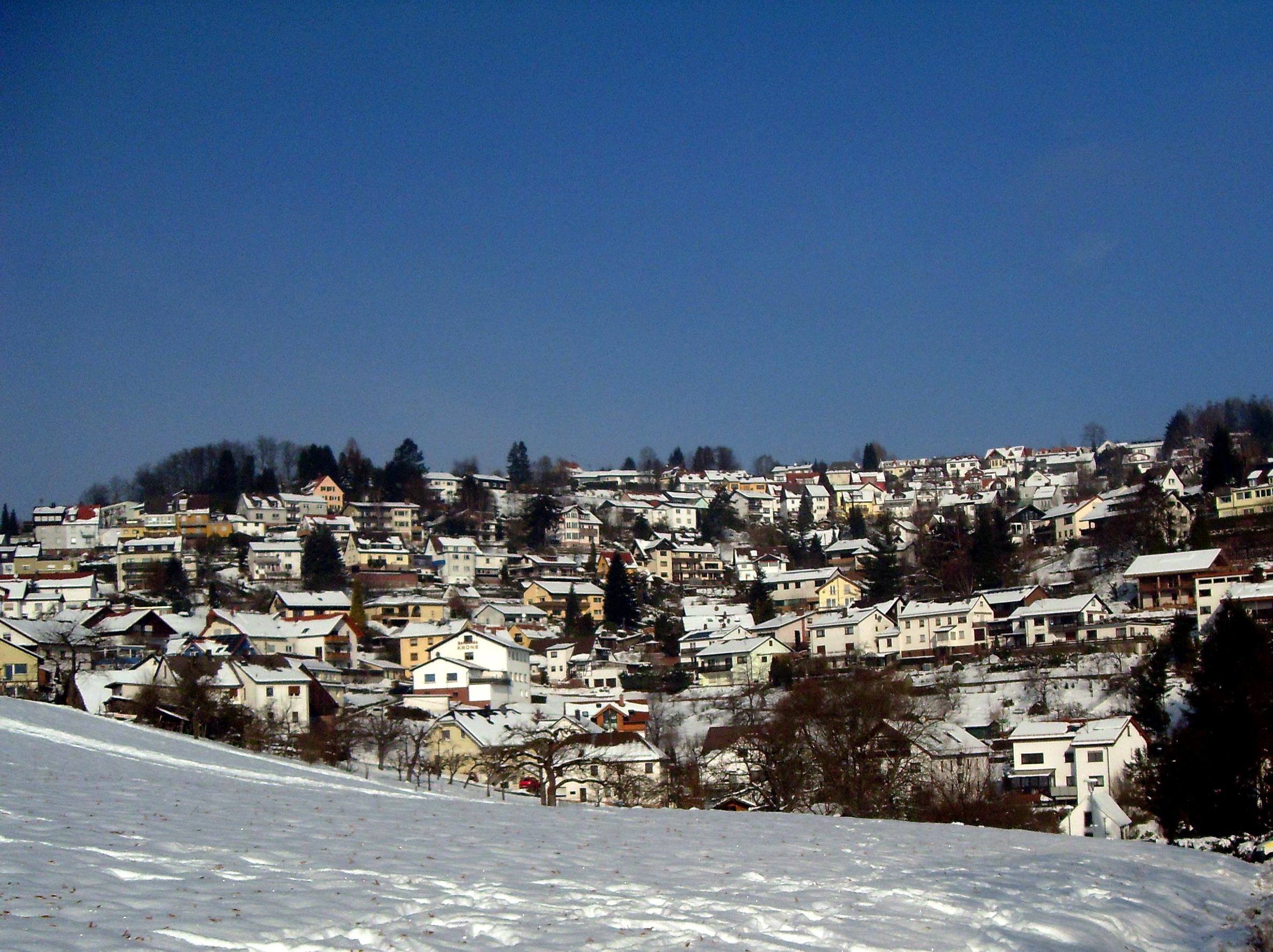 Wilhelmsfeld im Winter 2013.